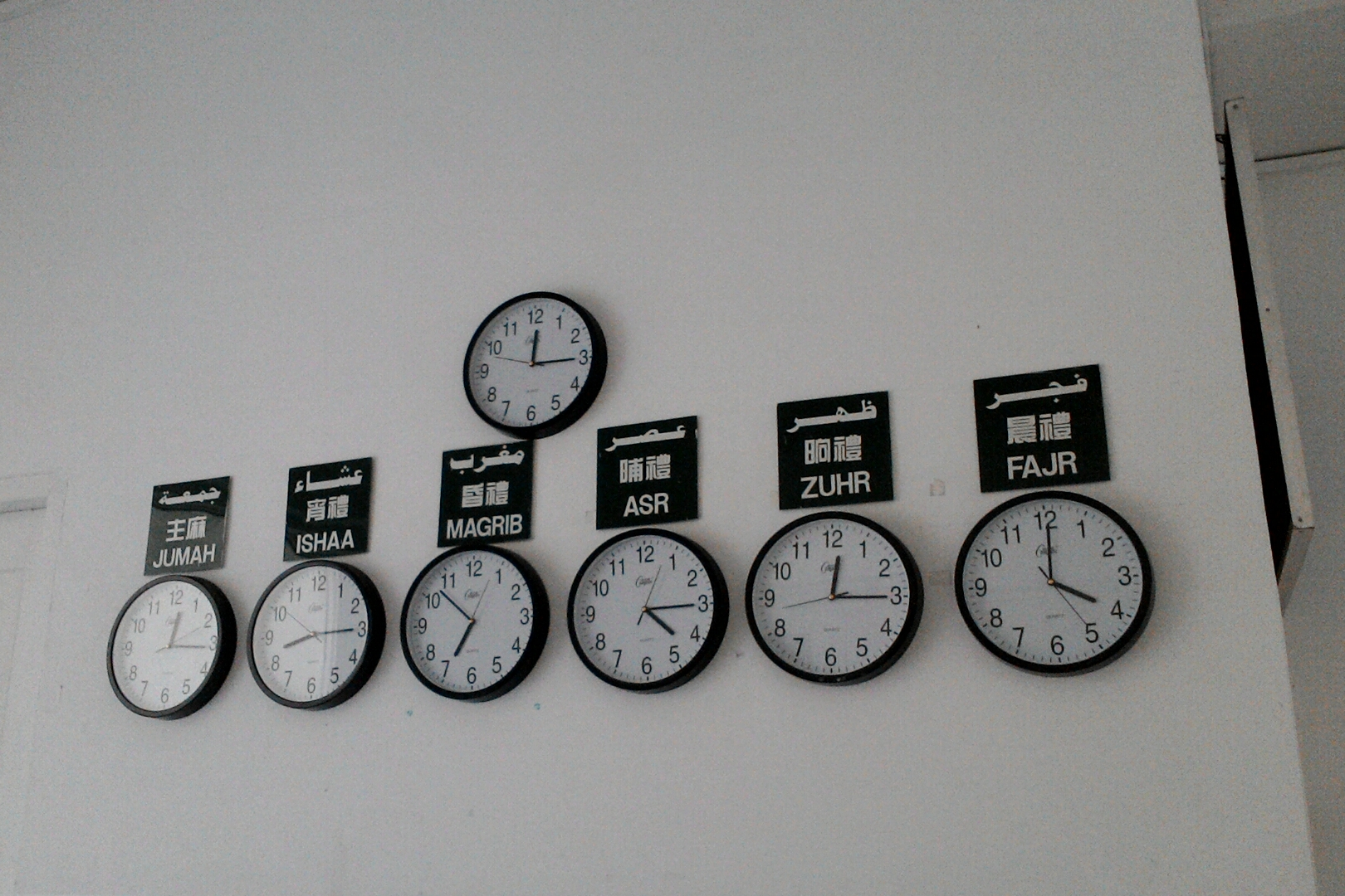 台北清真寺中標示薩拉赫時間的時鐘,台北市大安區和平次分區龍安里